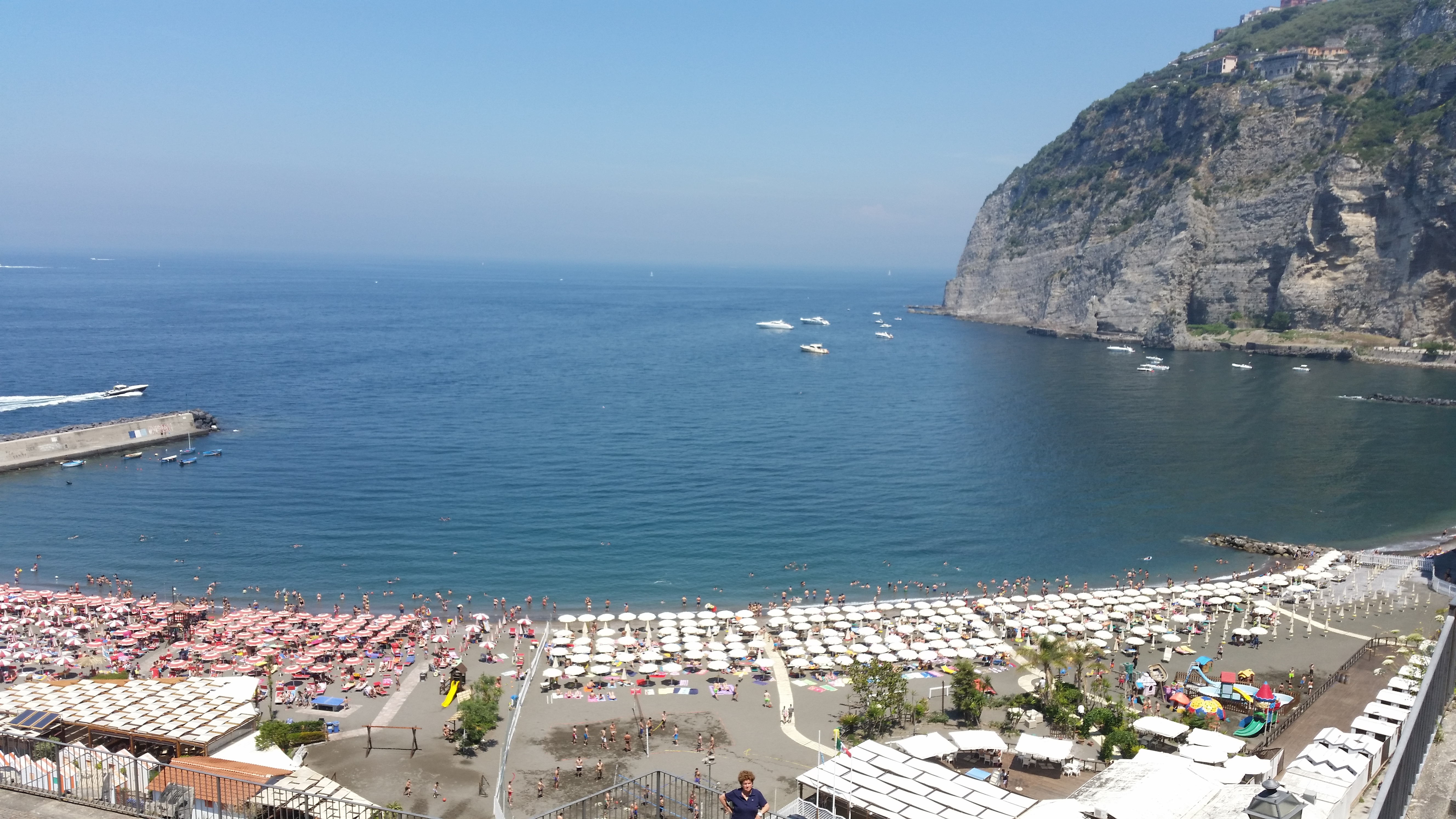 Meta di Sorrento, discesa verso il mare.